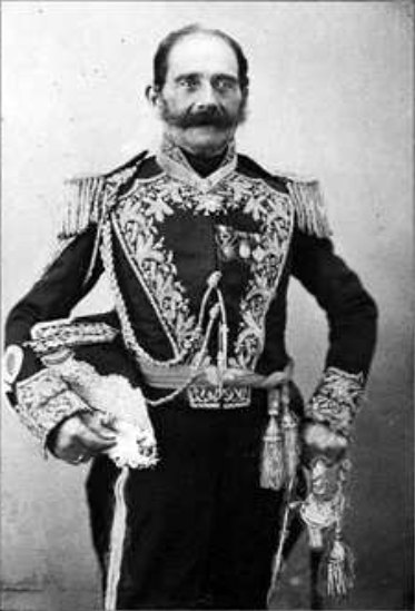 General Juan Gregorio de las Heras (1780-1866). Complejo Museográfico Enrique Udaondo